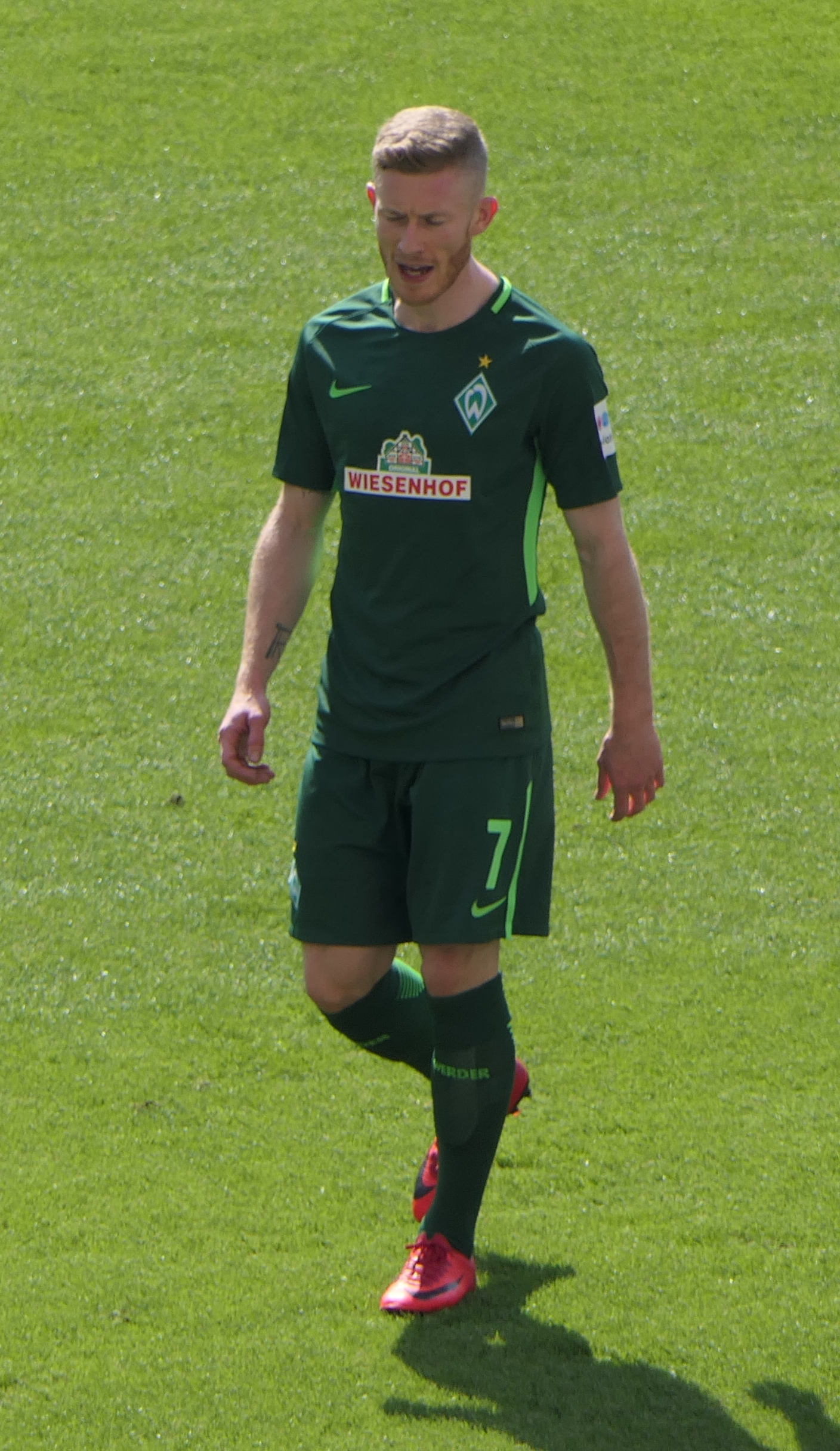 Der Fussballprofi Florian Kainz im Trikot vom SV Werder Bremen beim Auswärtsspiel gegen den VfB Stuttgart am 21.04.2018.